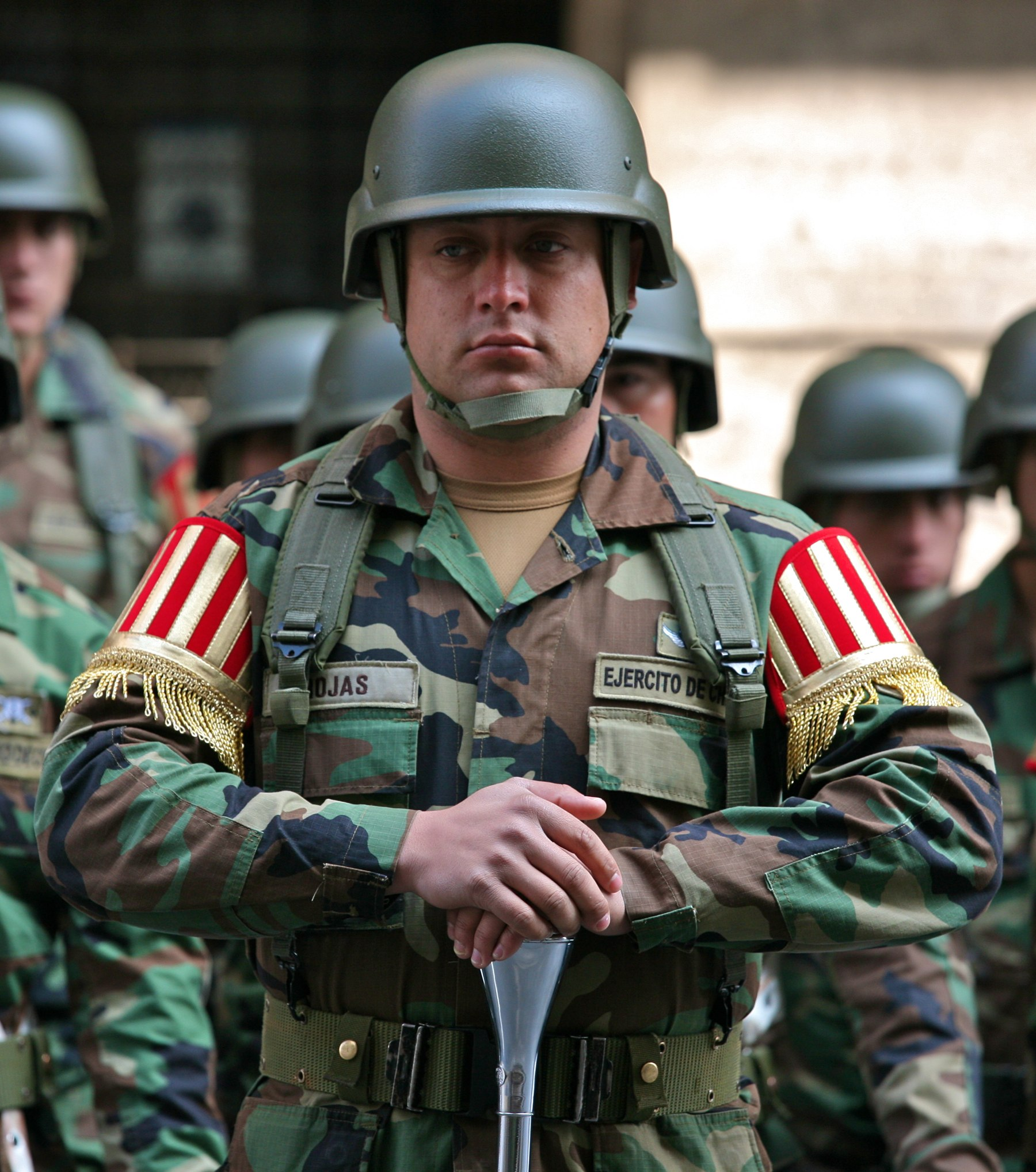 Chilská armádní kapela